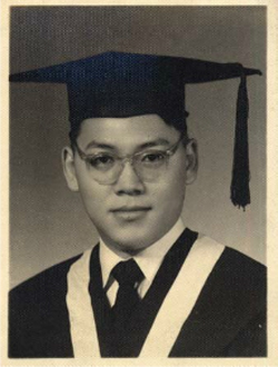 民国四十三年（1954年），林明德自國立台灣大學法律系畢業学士照